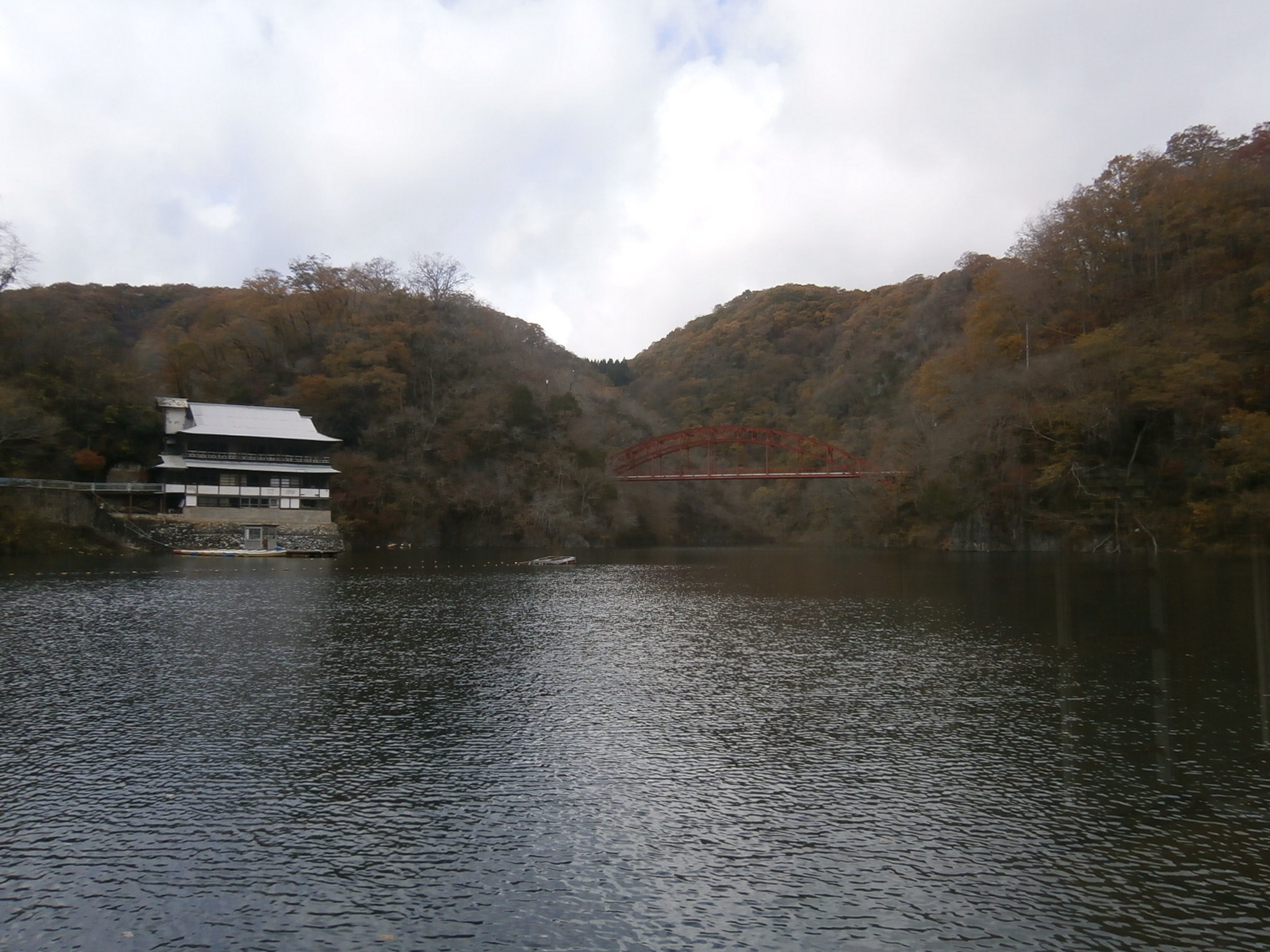 広島県にある帝釈峡にかかる桜橋